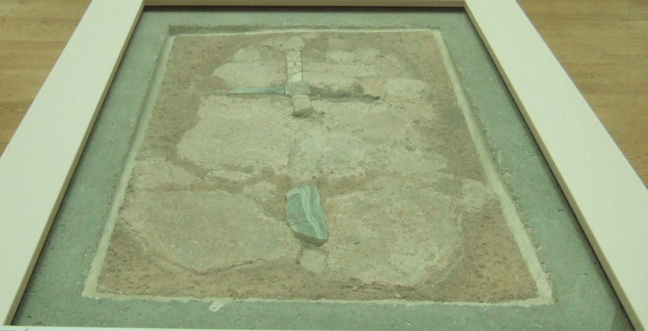 Estrichkreuz – 6. Jahrhundert Material: Kalksandstein und Marmor Fundort: Bonner Münster heutiger Standort: Rheinisches Landesmuseum Bonn